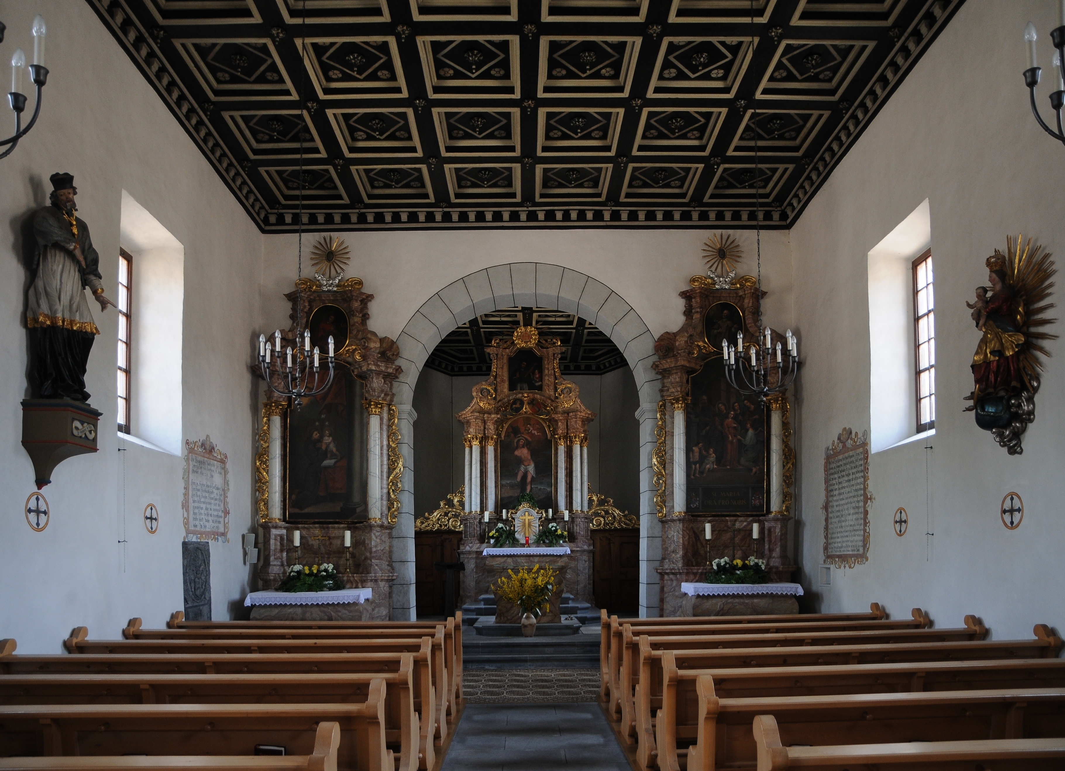 hll. Sebastian und Antonius (Betraum) an der St.Anton-Straße in Hohenems; Info Dieses Objekt steht unter Denkmalschutz.